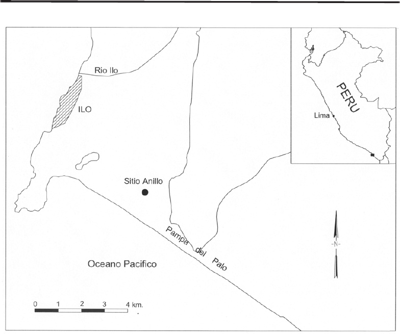 Solo fines educativos.